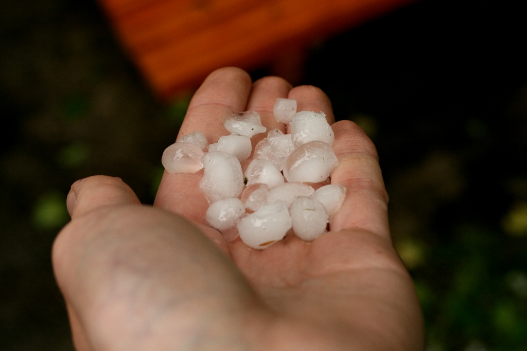 Grad